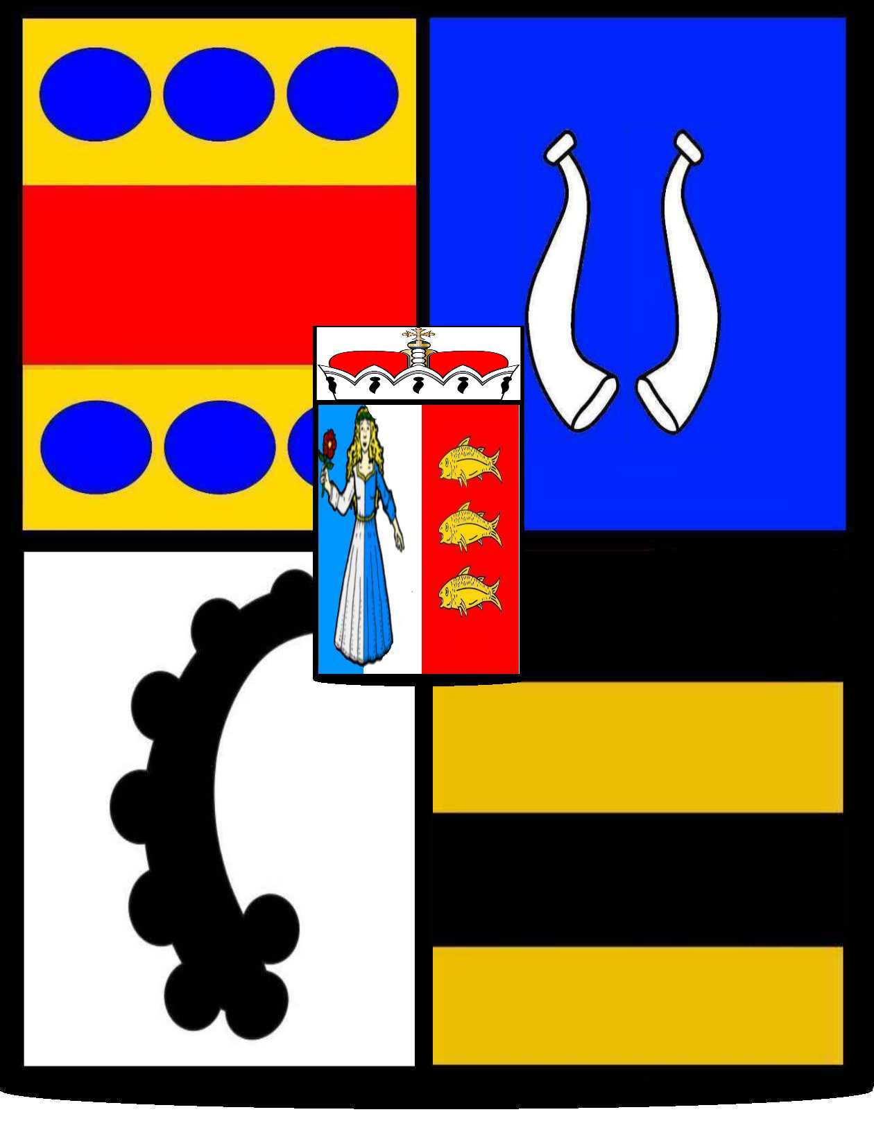 COA Johann Anton von Buol-Schauenstein (1710-1771) Reichsgraf, Blasonierung: Ein quadrierter Schild, Feld 1 in Gold ein roter Querbalken begleitet oben und unten von drei blauen Kugeln, Feld 2 in Blau die silbernen Büffelhörner und Feld 3 in Silber das schwarze Gemshorn von Haldenstein, Feld 4 in Gold zwei schwarze Querbalken. Herzschild:geteilt, von Blau und Silber gespalten eine Jungfrau verwechselter Farbe mit einer Rose (ursprünglich Kleestengel) in der Hand für Buol,in Rot drei goldenen Fische für Schauenstein; mit Rangkrone